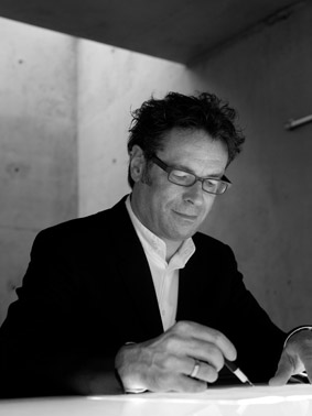 CARSTEN ROTH ARCHITEKT, Prof. Carsten Roth, Foto by Myrzik + Jarisch